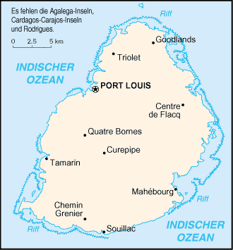 Karte von Mauritius